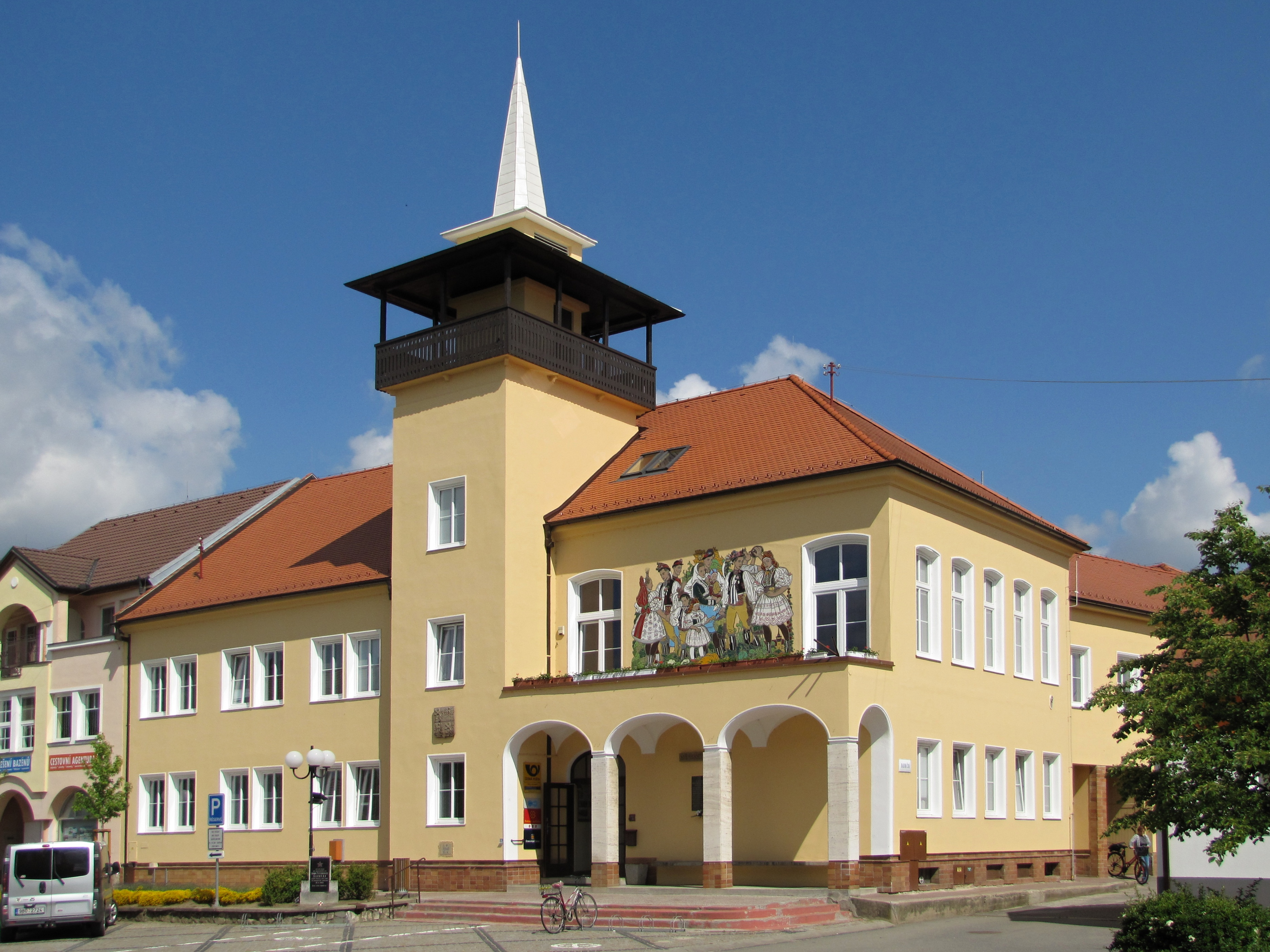 Radnice ve Vracově z let 1948–1950